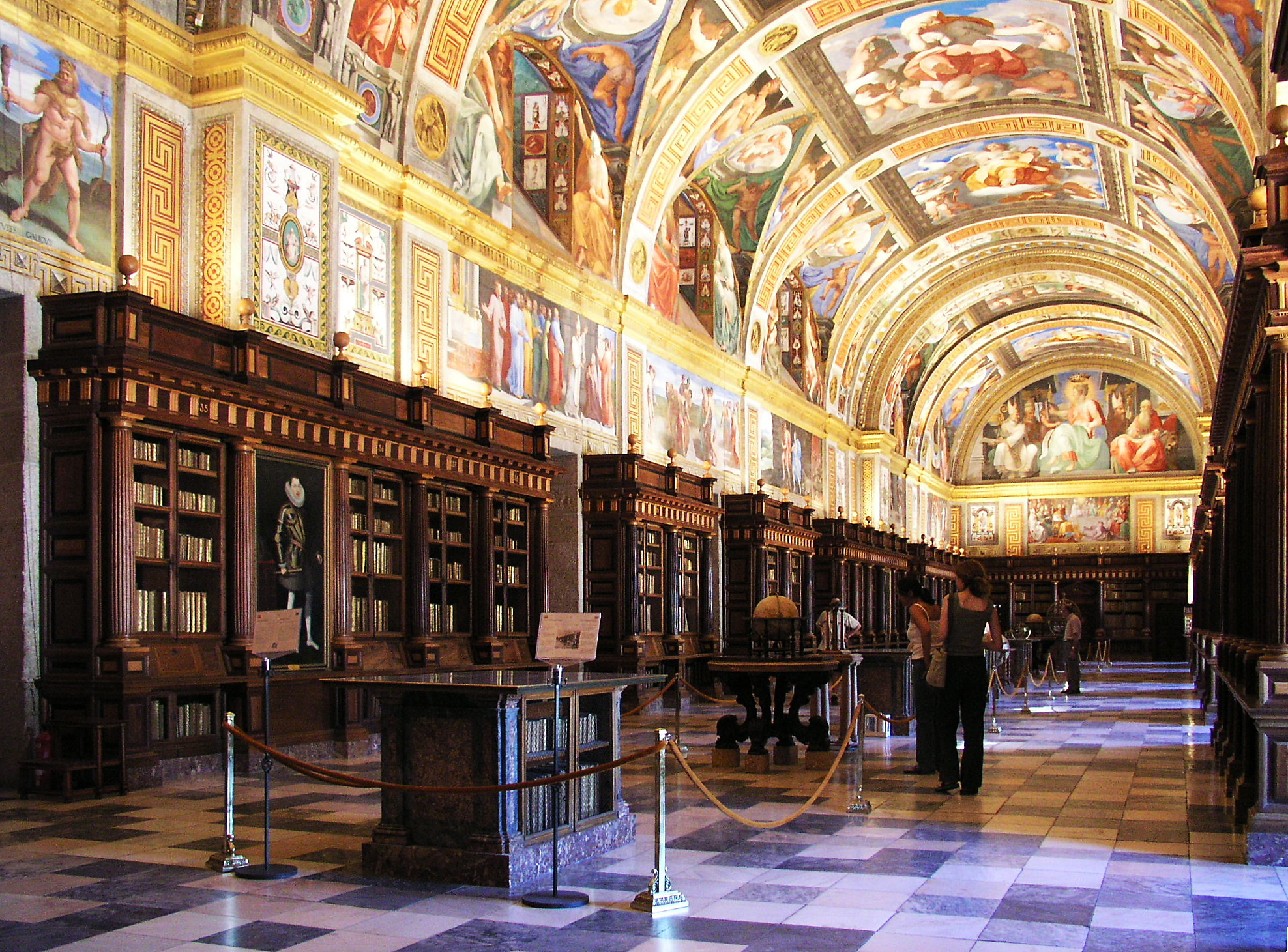 Biblioteca del monasterio de San Lorenzo de El Escorial, (España).